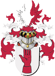 Heraldiek: het wapen van familie ter Haar